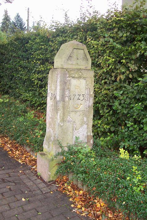 Kursächsischer Viertelmeilenstein Klaffenbach (Chemnitz)